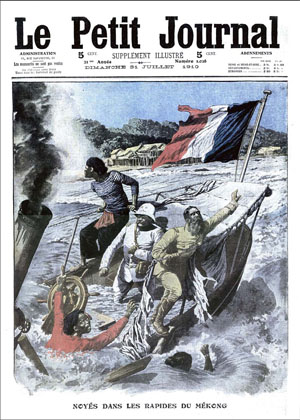 Naufrage de la cannonière La Grandière sur le Mékong en Indochine française le 15 juillet 1910. A son bord, le général Léon de Beylié et le médecin major Vincent Ruffiandis et deux autres matelots sont noyés.